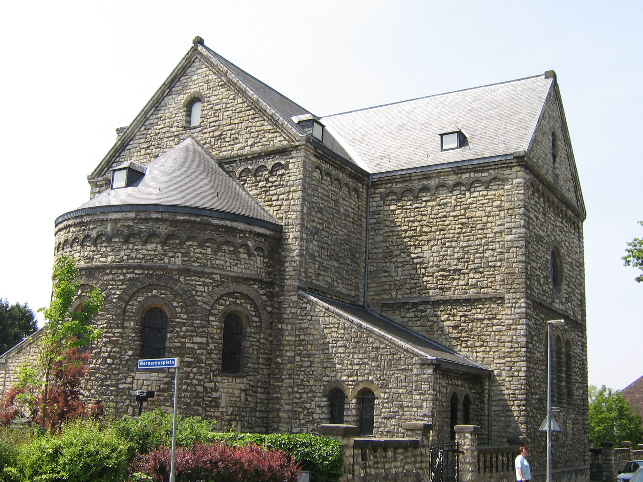 De Ubichberg, Roemaonse Kèrk. Ubachsberg (gemeente Voerendaal), dorpskerk. Ubachsberg, Voerendaal community, NL, romance style village church